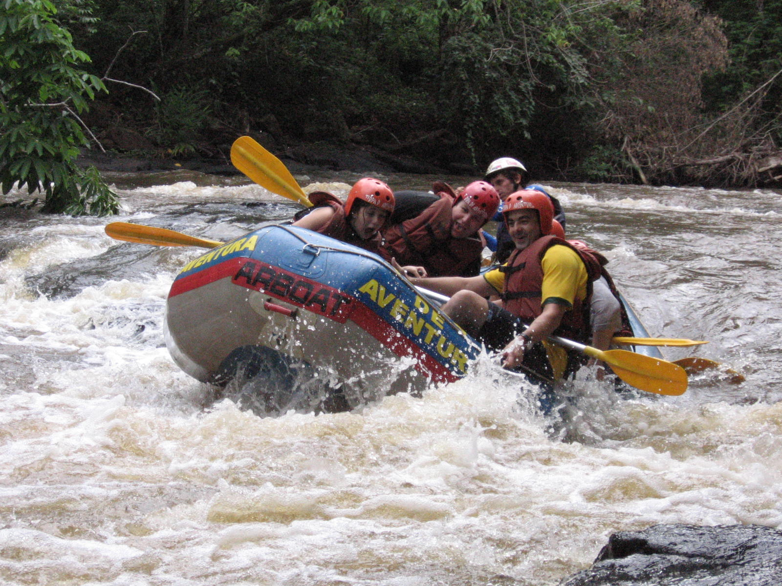 pt - Rafting no Rio Jacaré Pepira em Brotas, São Paulo, Brasil. en - Rafting - Jacaré Pepira River, Brotas (city), São Paulo (state), Brasil (country).